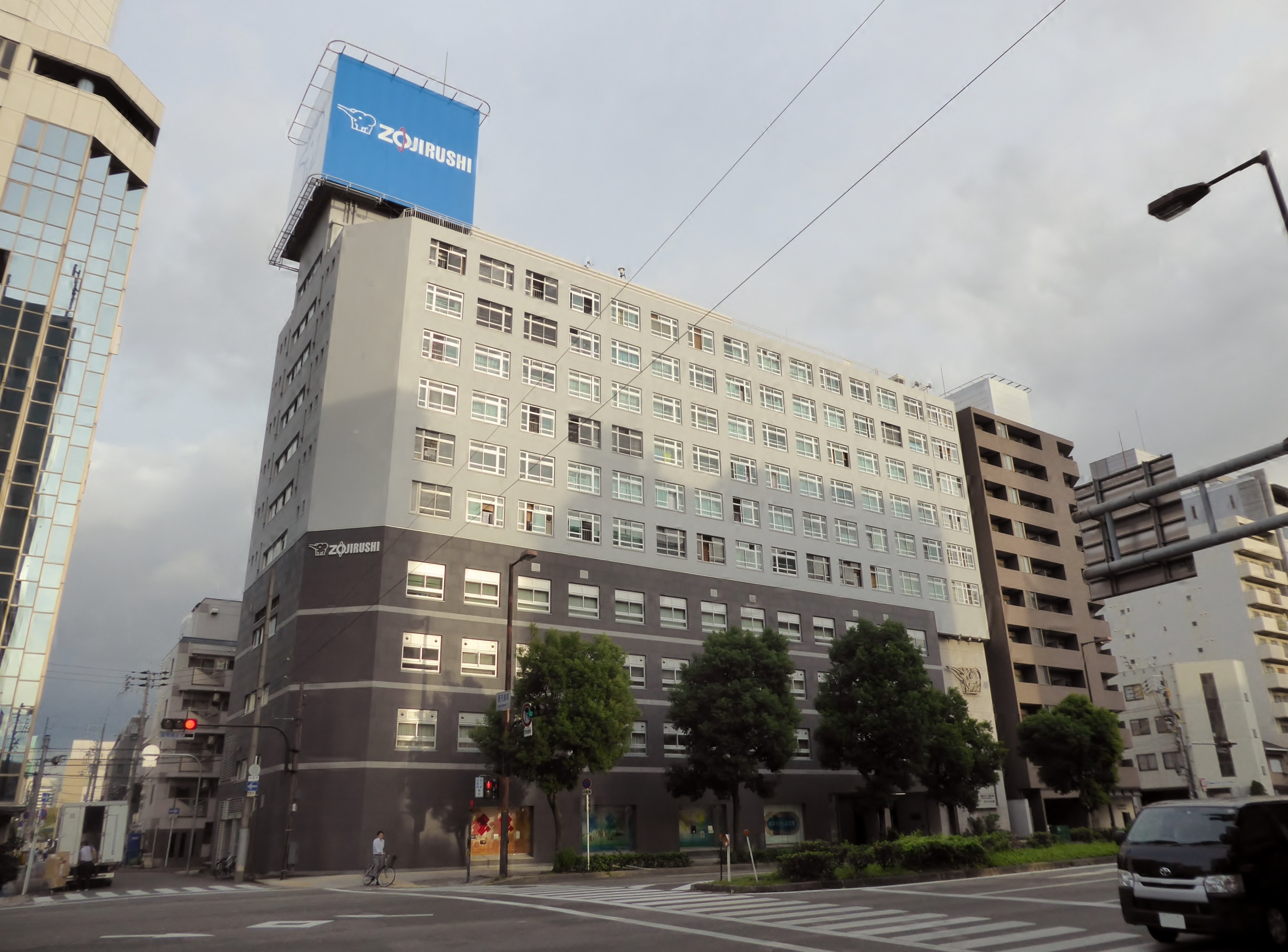 象印マホービン株式会社本社を撮影。